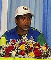 Demetrio do Amaral de Carvalho auf dem ersten Nationalkongress der PLP